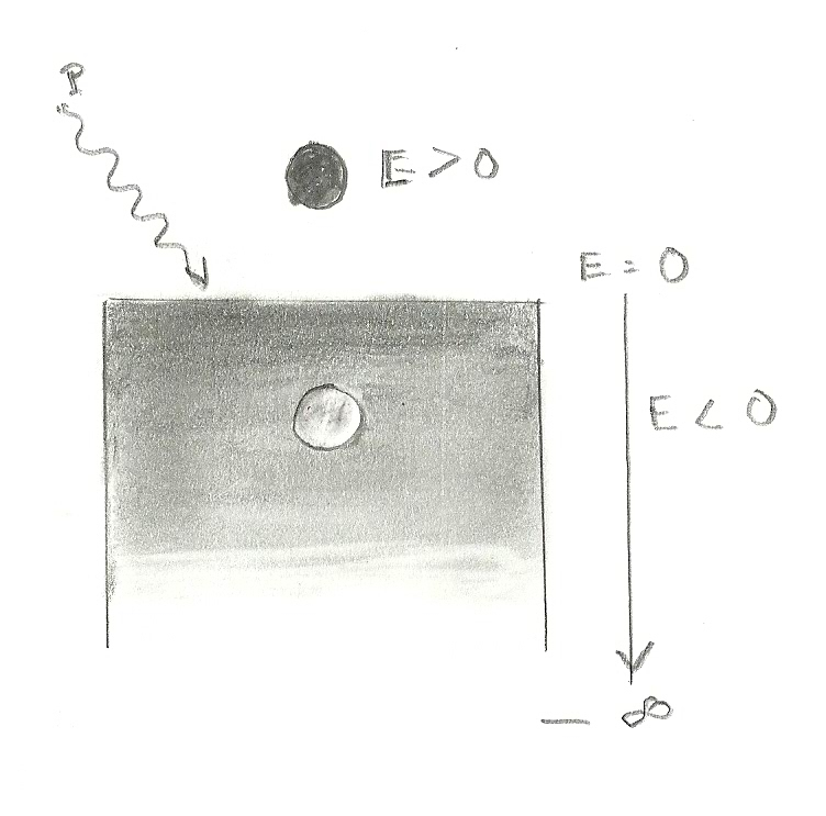 Représentation de l'état "excité" du vide quantique d'après Paul Dirac.